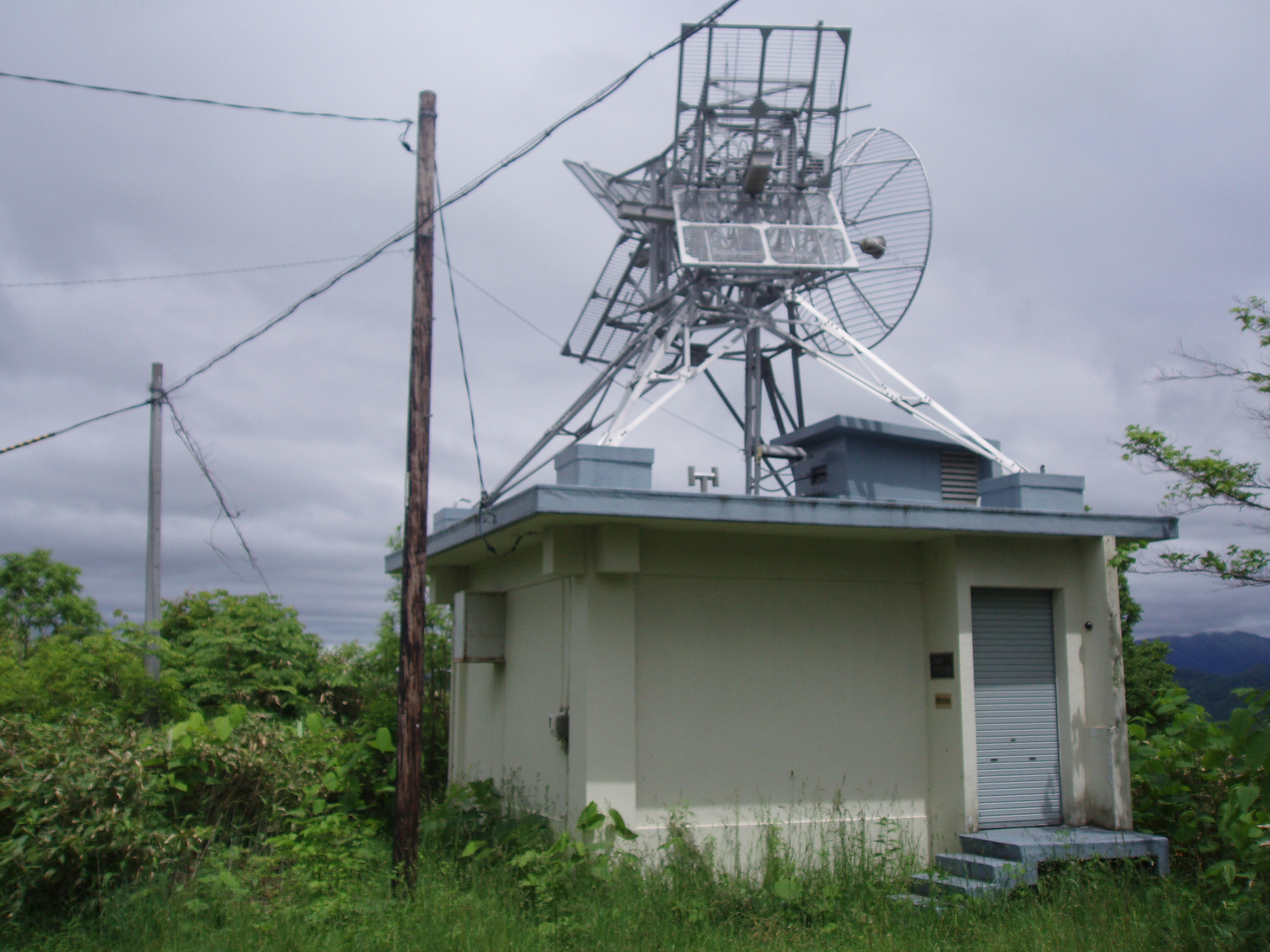 留萌テレビ中継局 HBC送信設備